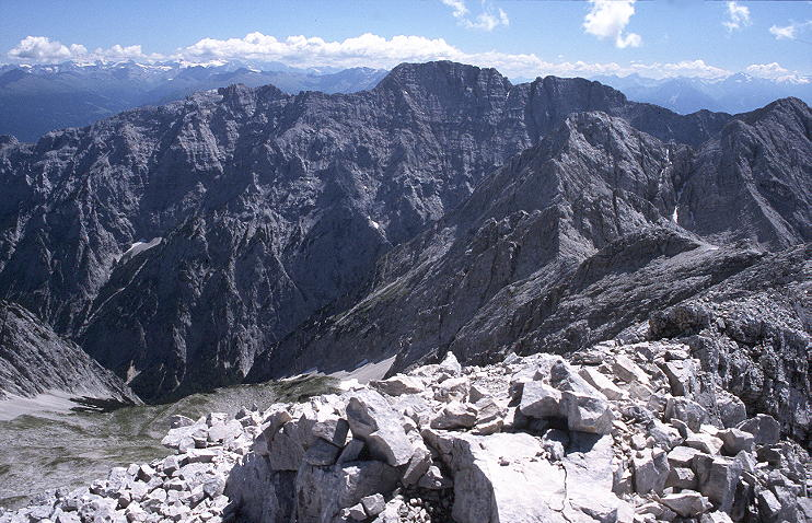 Großer und Kleiner Bettelwurf von Norden (von der Grubenkarspitze), Karwendel